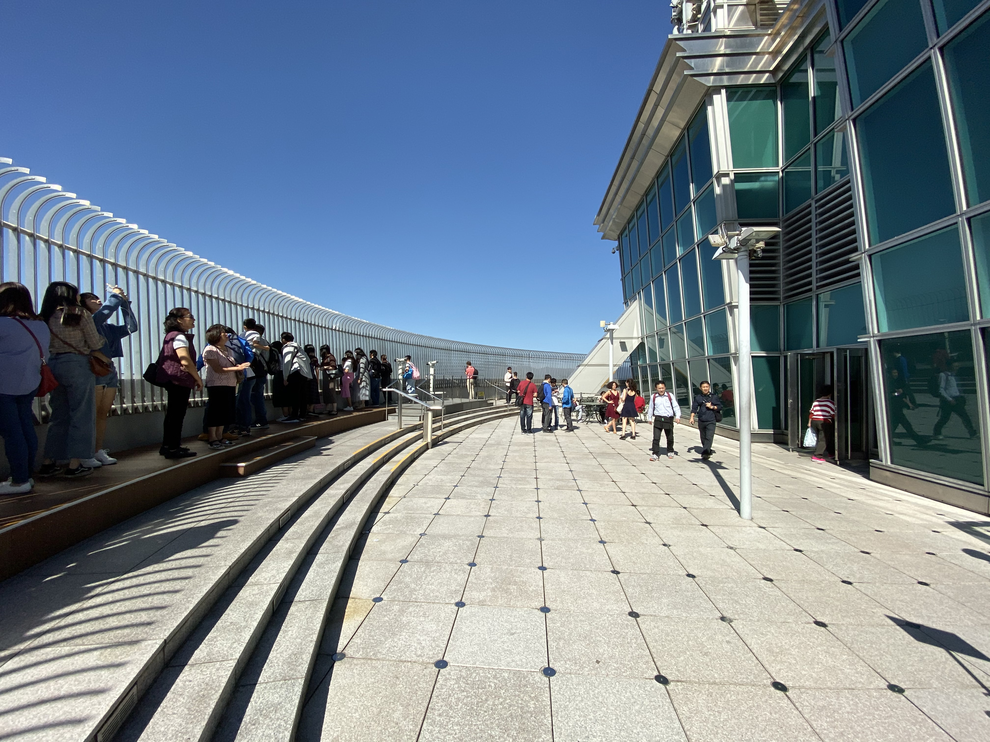 Taipei 101 91F Outdoor Observatory